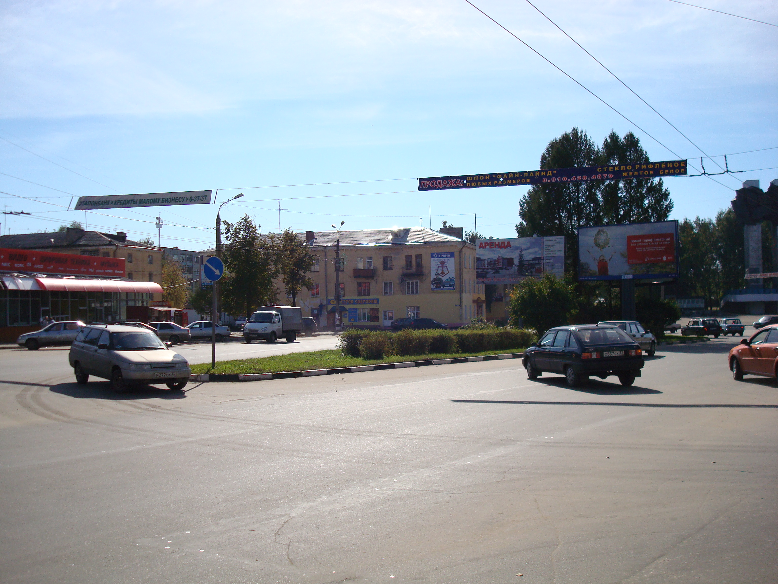 Около ТЦ 200 лет (г. Ковров)